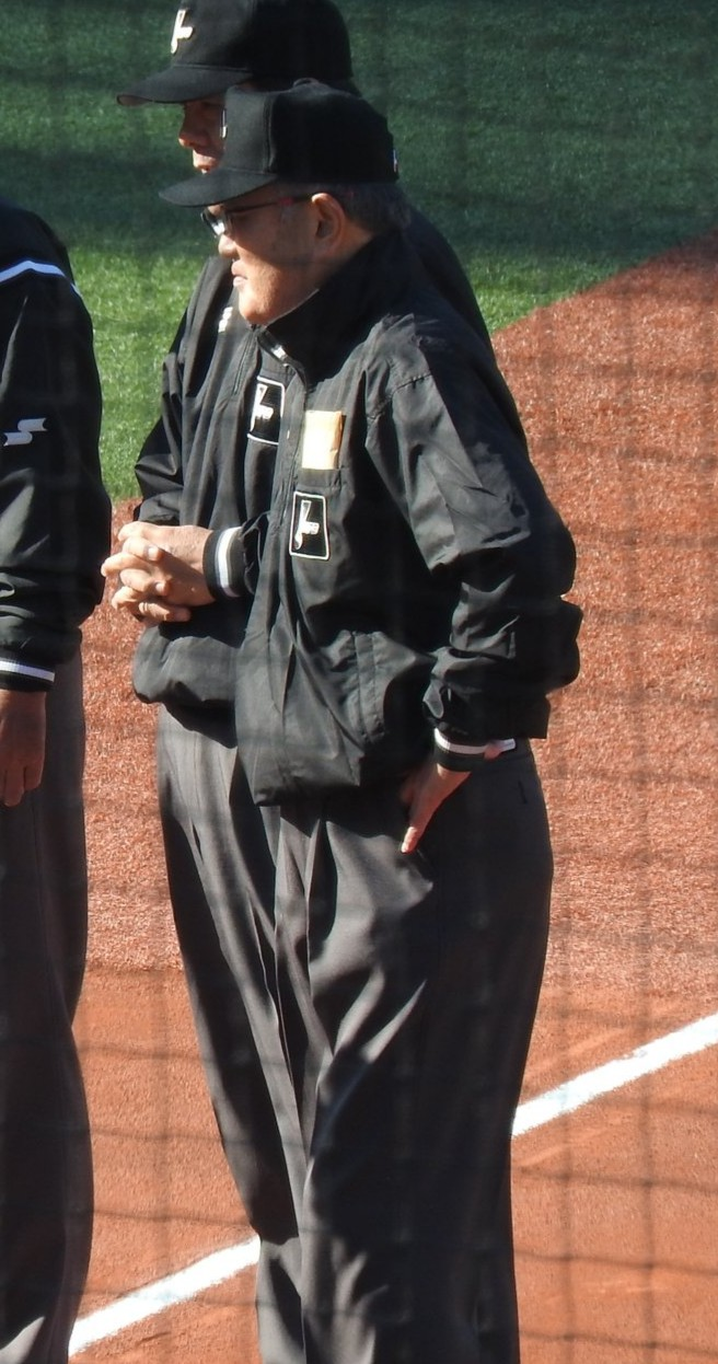 渡田均審判員